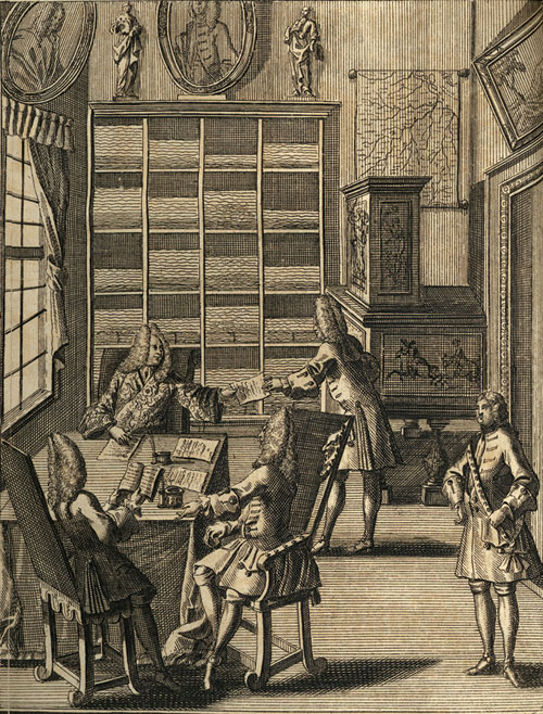 Office, around 1710–1720; from: Julius Bernhard von Rohr: Nöthiger und nützlicher Vorrath Von allerhand auserlesenen Contracten, Verträgen, Recessen, Bestallungen, ... und andern dergleichen Concepten, Die sowol bey der Hauß-Wirthschafft Ueberhaupt Als insonderheit bey dem Acker-Bau, der Vieh-Zucht, Jagd- und Forst-Sachen, Wasser und Fischereyen, Bierbrauen, Weinbau, Bergwercken ... vorzufallen pflegen ... Nach der Ordnung des vollständigen Haußhaltungs-Rechts. Johann Christian Martini, Leipzig 1719